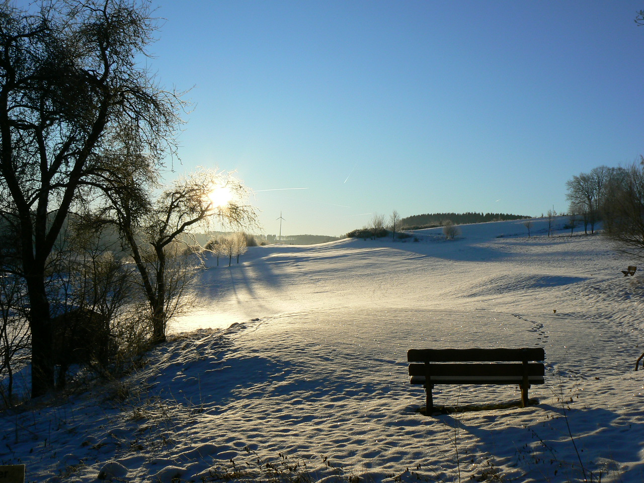 Winterlandschaft im Berghäuser Tal